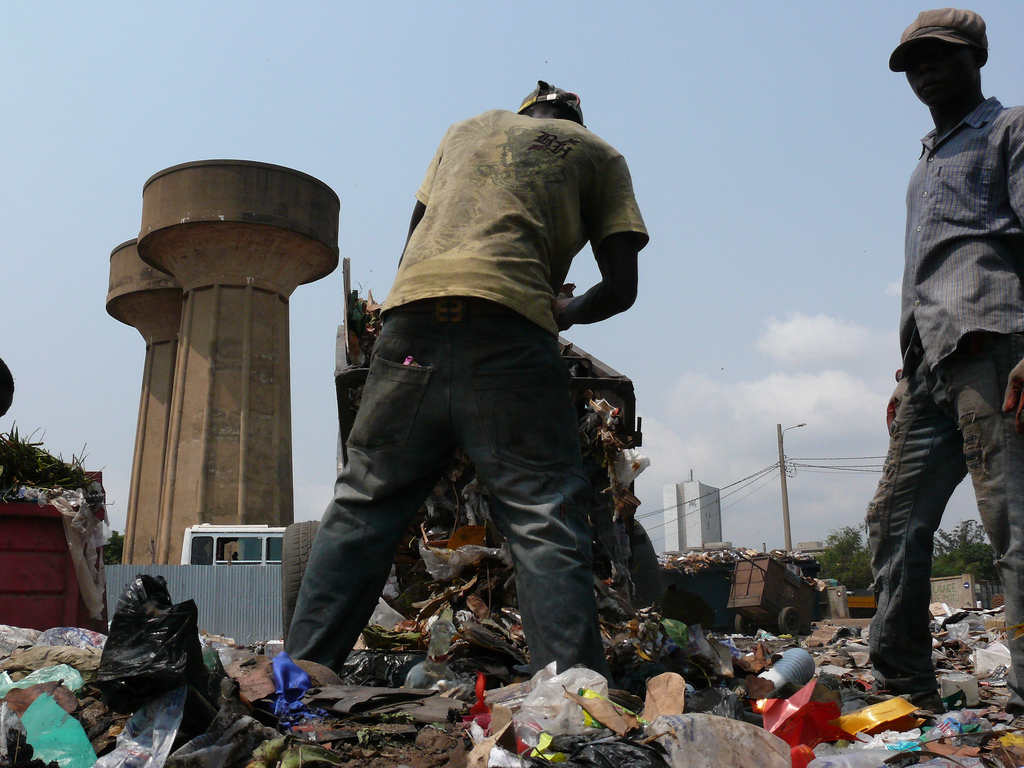 Déchets au centre-ville de Lomé (Togo)